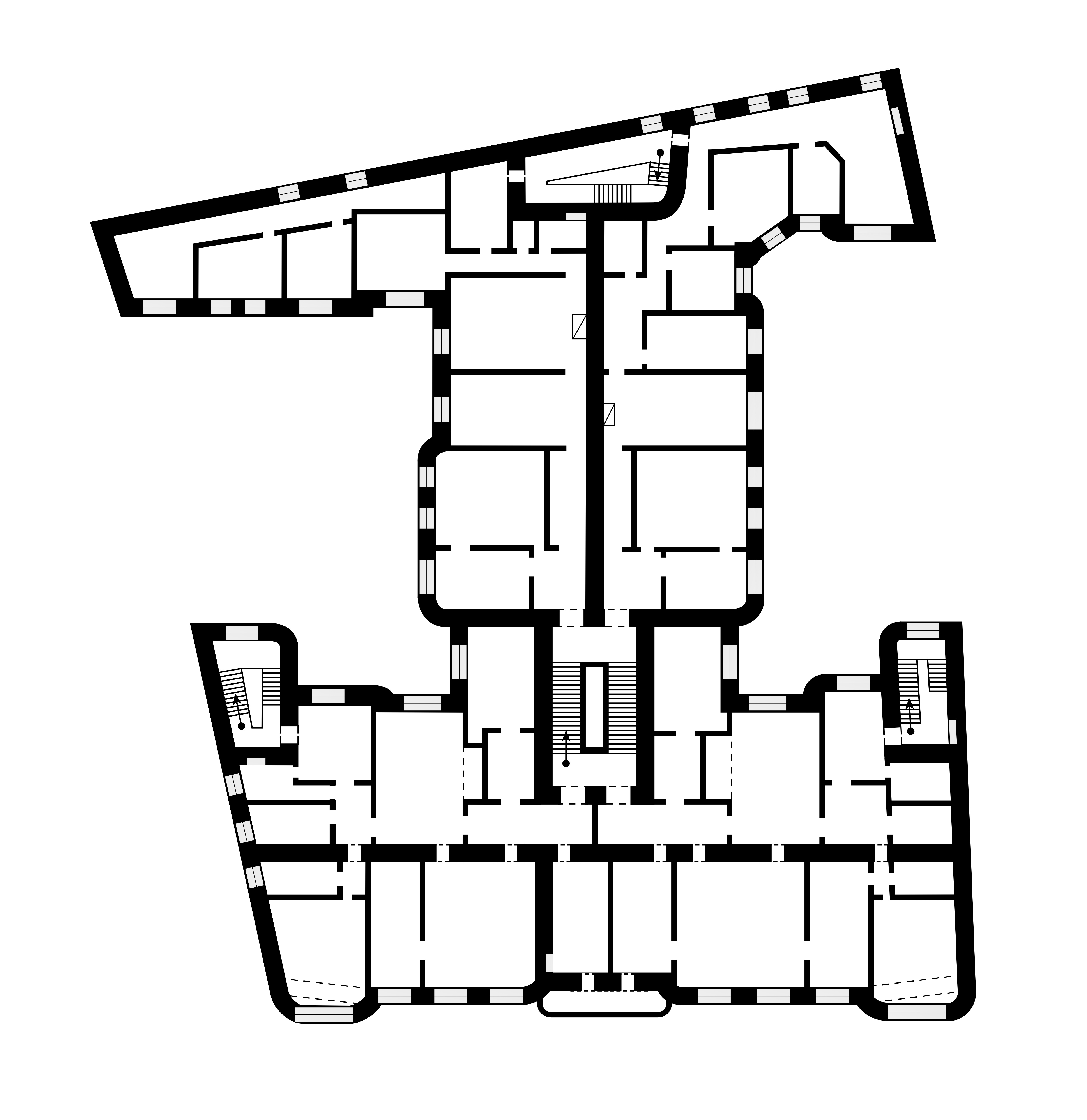 План доходного дома И. П. Исакова на Перчистенке, 28 (на основе Аренкова Ю. И., Домшлак М. И., Мехова Г. И. и др. Земляной город // Памятники архитектуры Москвы. — М.: Искусство, 1990. — С. 93)